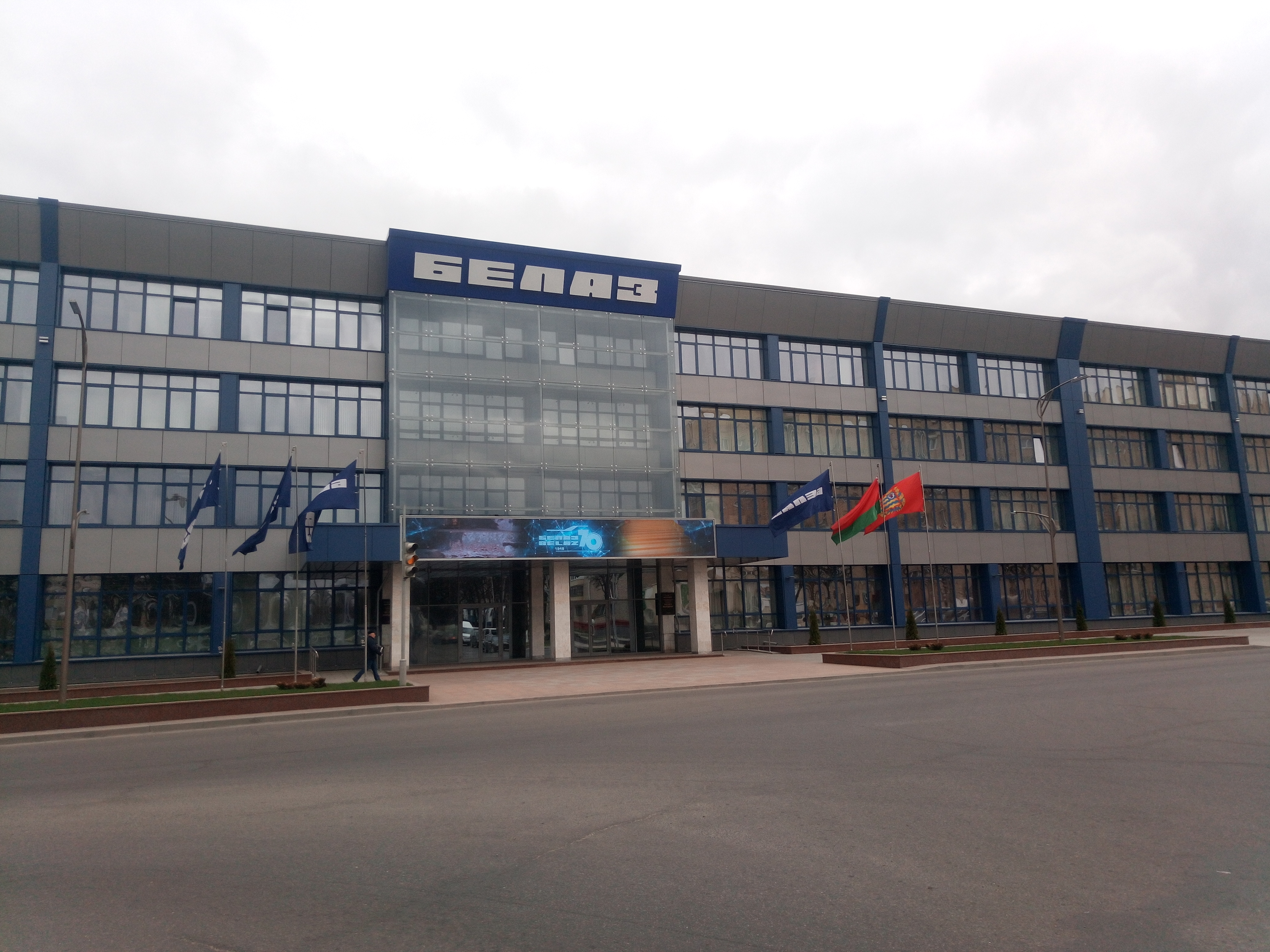 Галоўны ўваход БелАЗа.